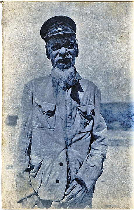 Postal de Timor Leste